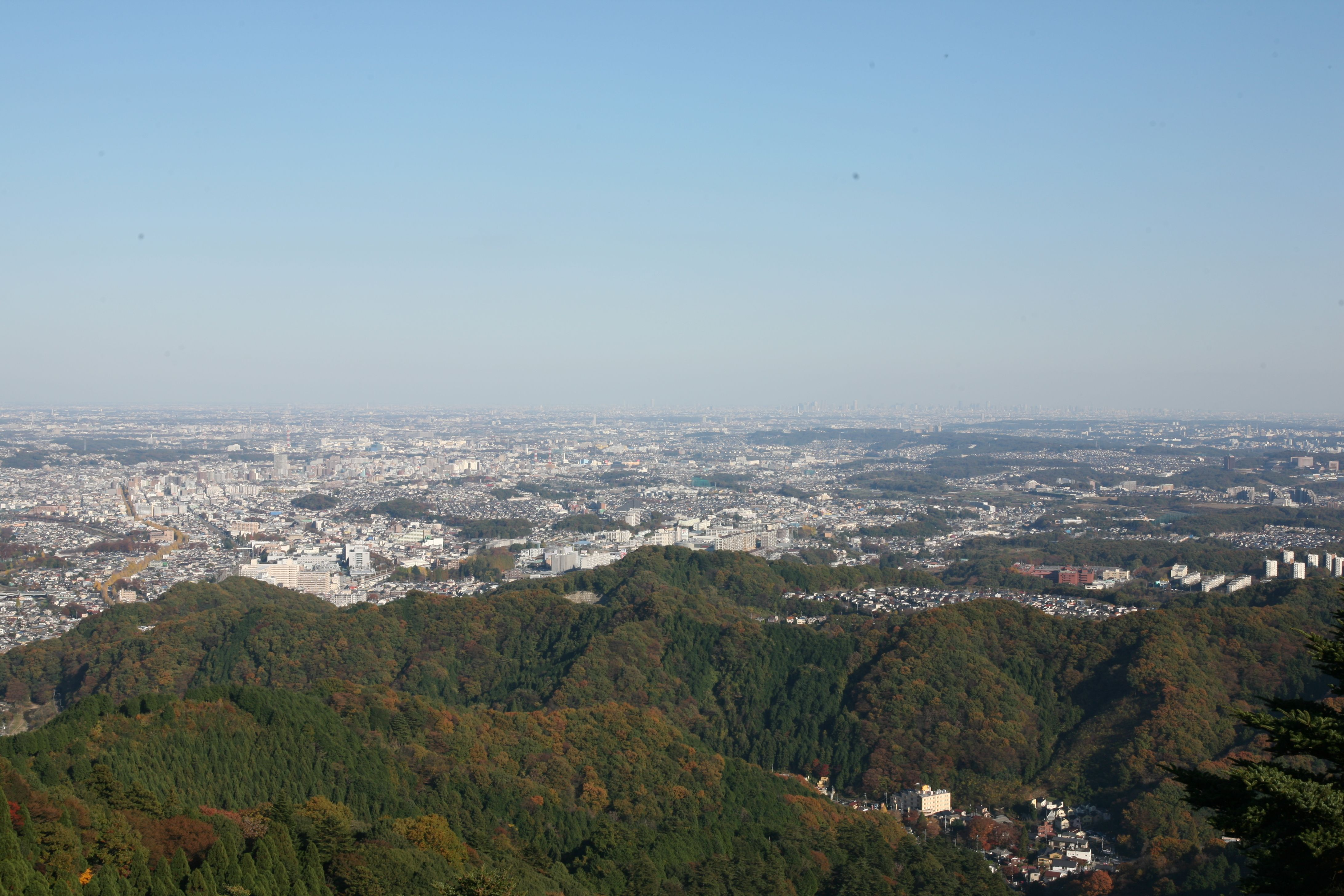 高尾山からの風景